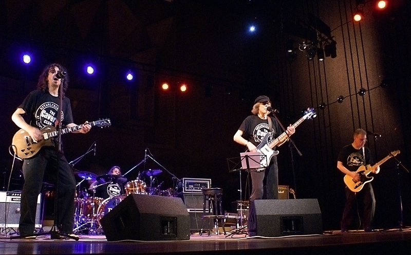 Zdjęcie wykonano podczas koncertu The Bootels w Filharmonii Łódzkiej